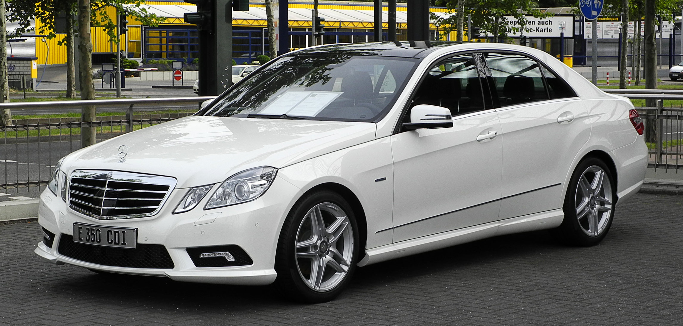 Mercedes-Benz E 350 CDI BlueEFFICIENCY 4MATIC Avantgarde Sport-Paket AMG (W 212)